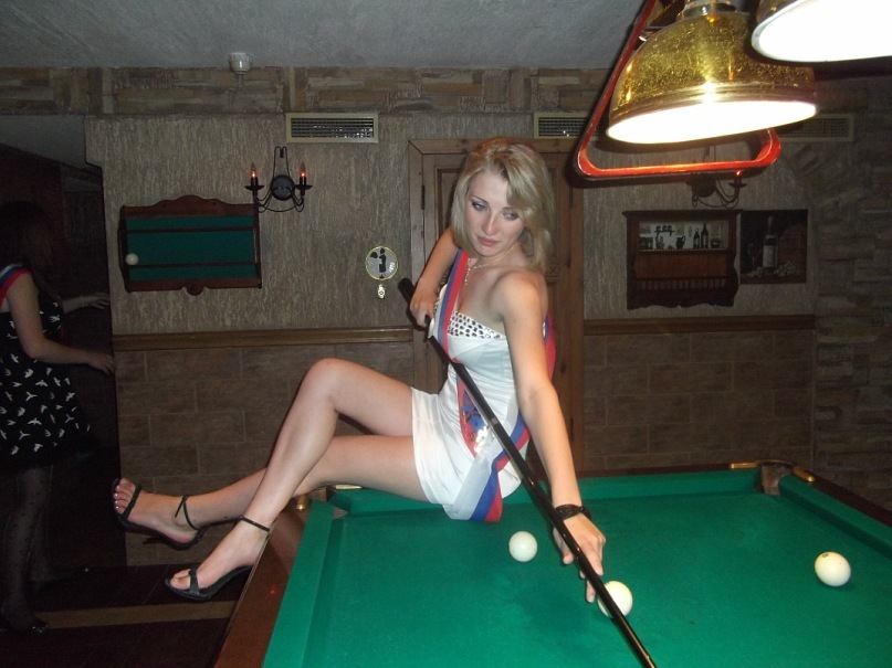 Last bell celebration. Russian school girl from Saint-Petersburg (School №608) plays in Billards